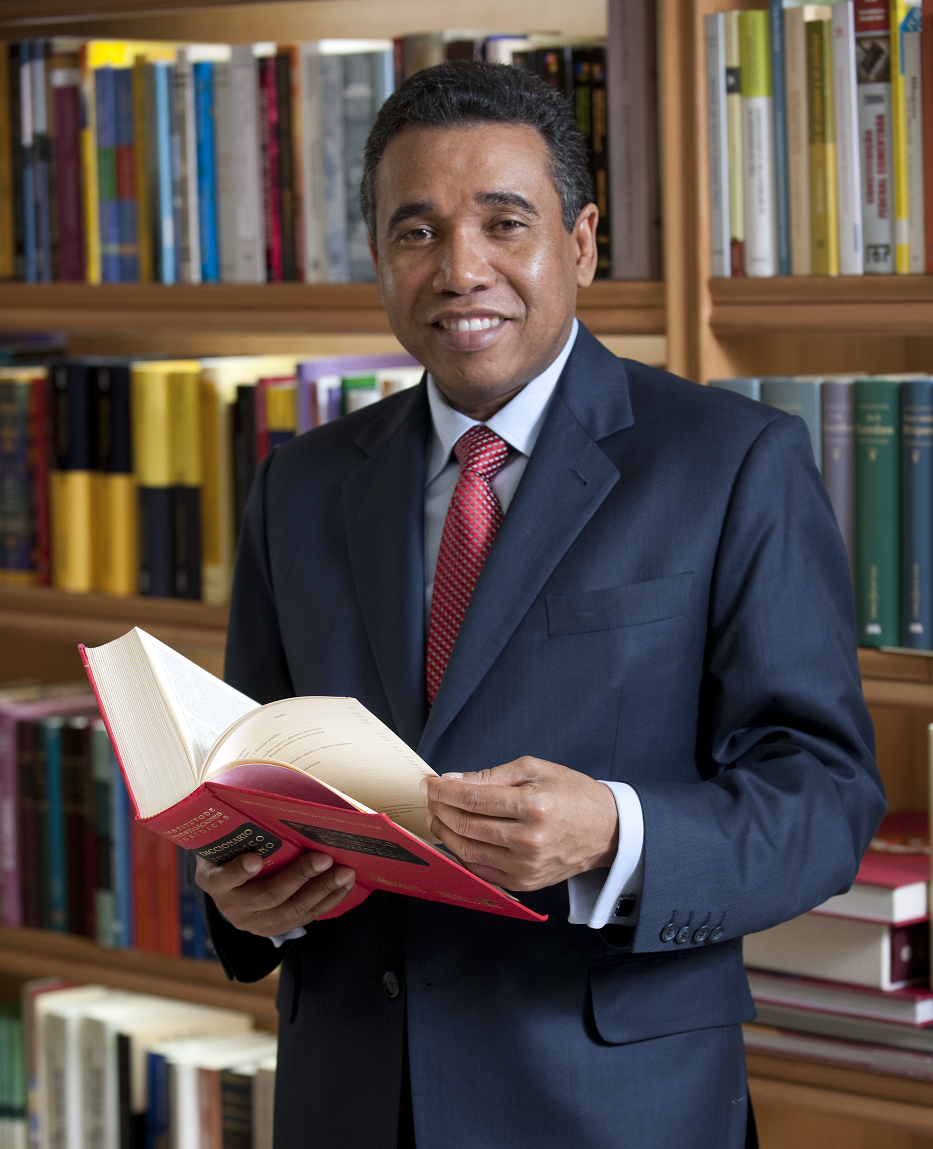 Senador Félix Bautista Rosario